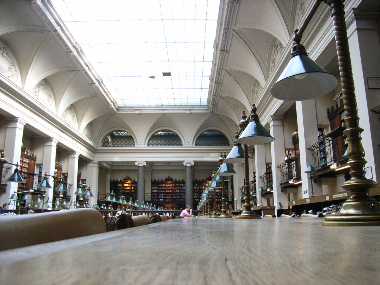 Großer Lesesaal der Universitätsbibliothek Wien